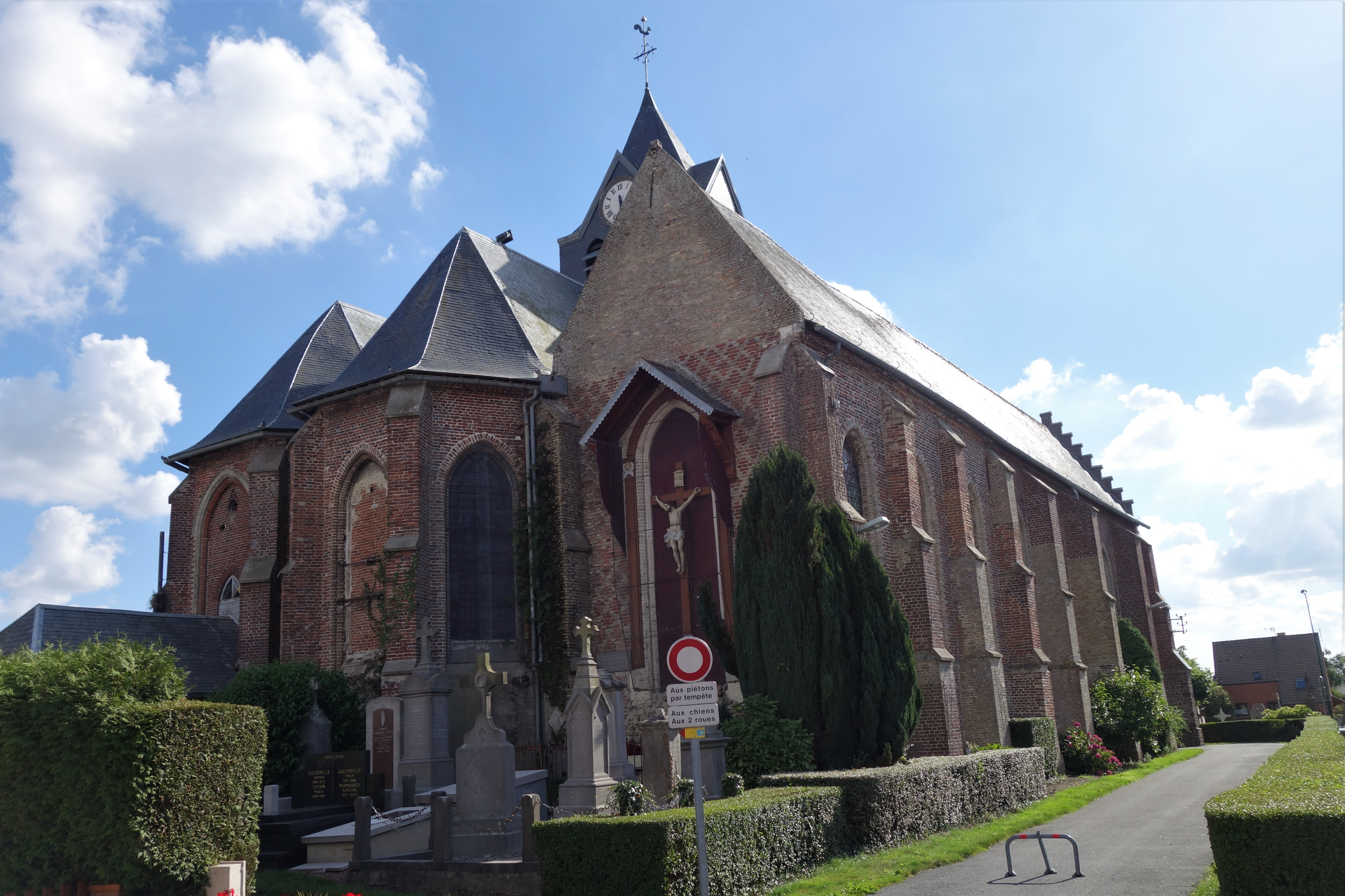 de type église-hall ou hallekerque (hallekerk) constituée de trois nefs, éléments romans, signes runiques visibles ici sur le chevet